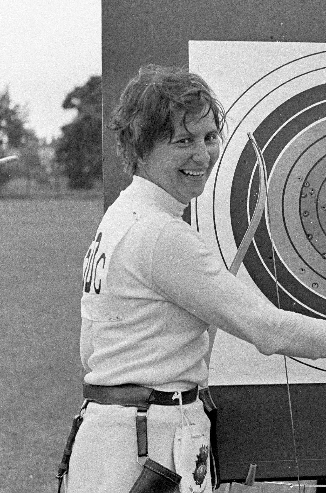 Wereldkampioenschappen Boogschieten te Amersfoort. Maria Maczynska